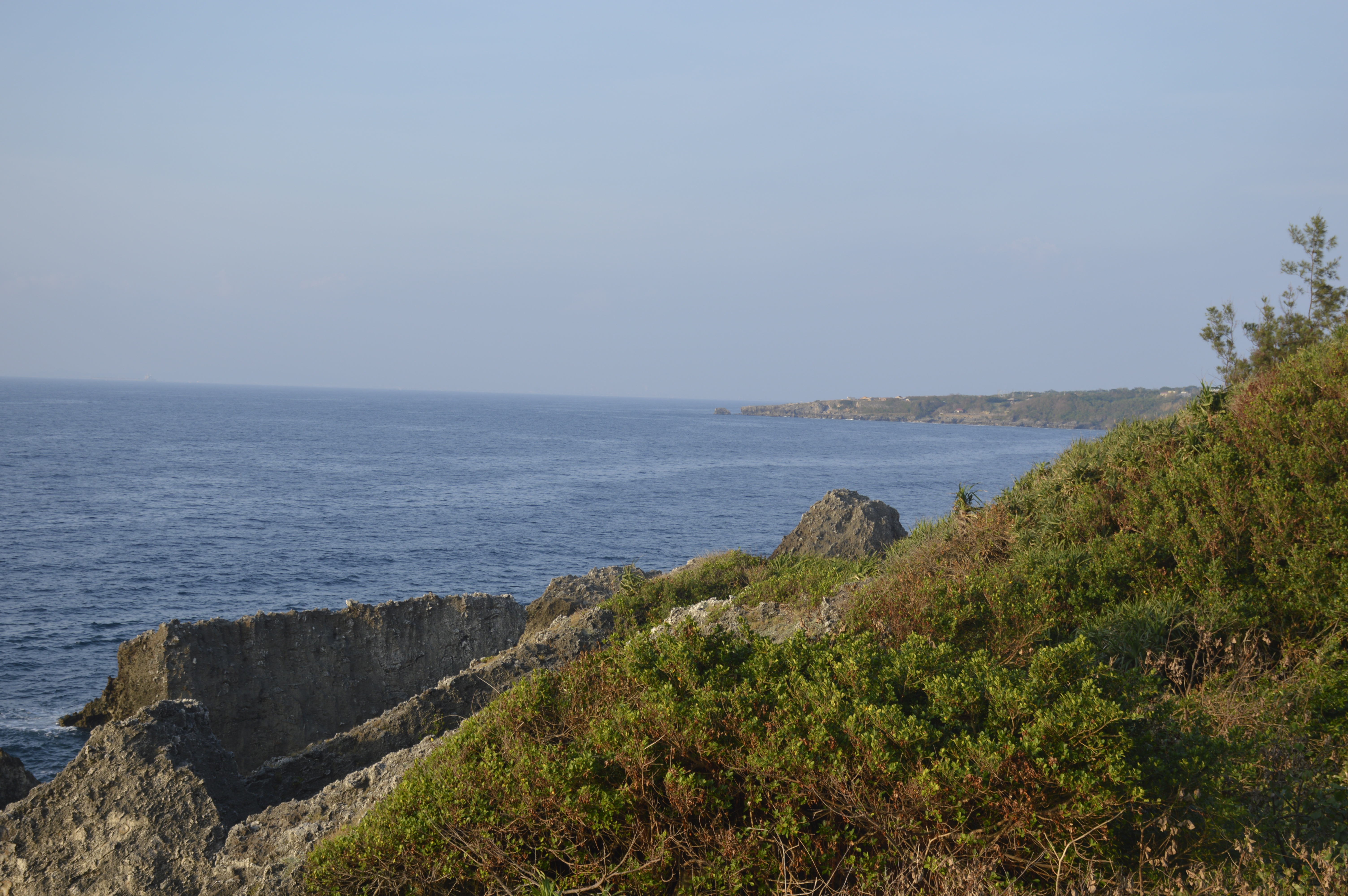 中文（台灣）: 琉球鄉烏鬼洞園區的海景